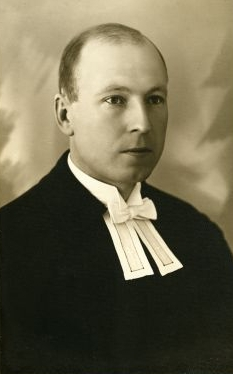 August Arumäe